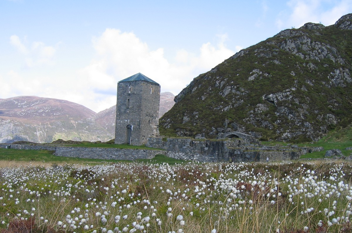 Selje kloster, Selje, Norway